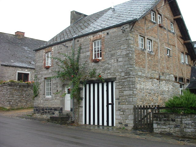 Photo personnelle dans le village de Furfooz